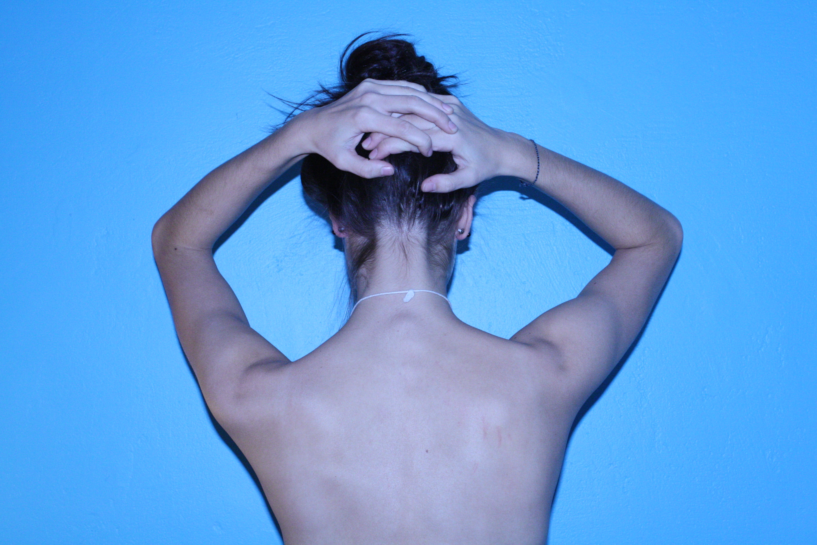 Human female neck